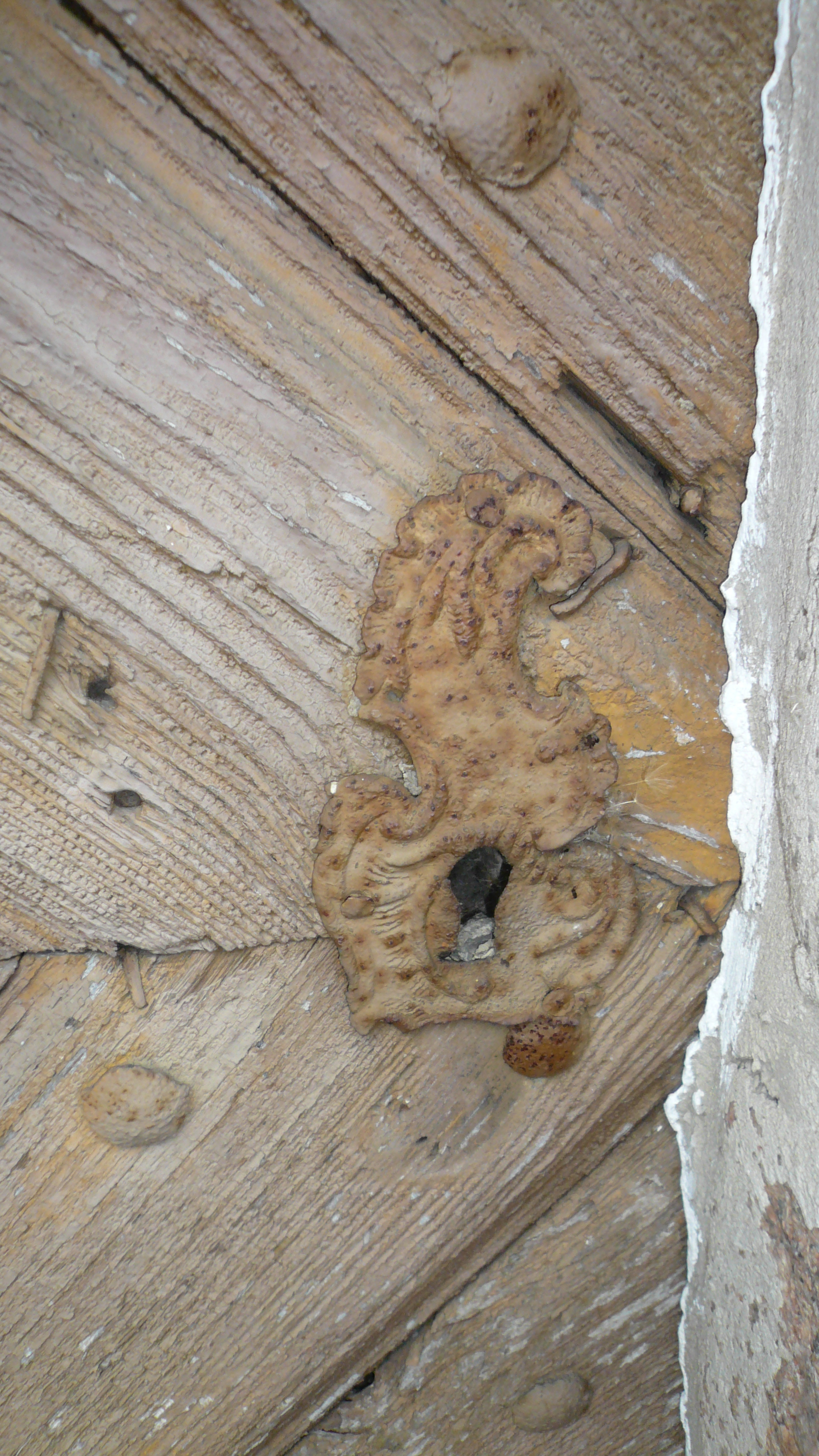 Dolsko - rzymskokatolicki kościół filialny p.w. św. Elżbiety, 2 poł. XIII (rokokowa tarcza zamka do drzwi bocznych)